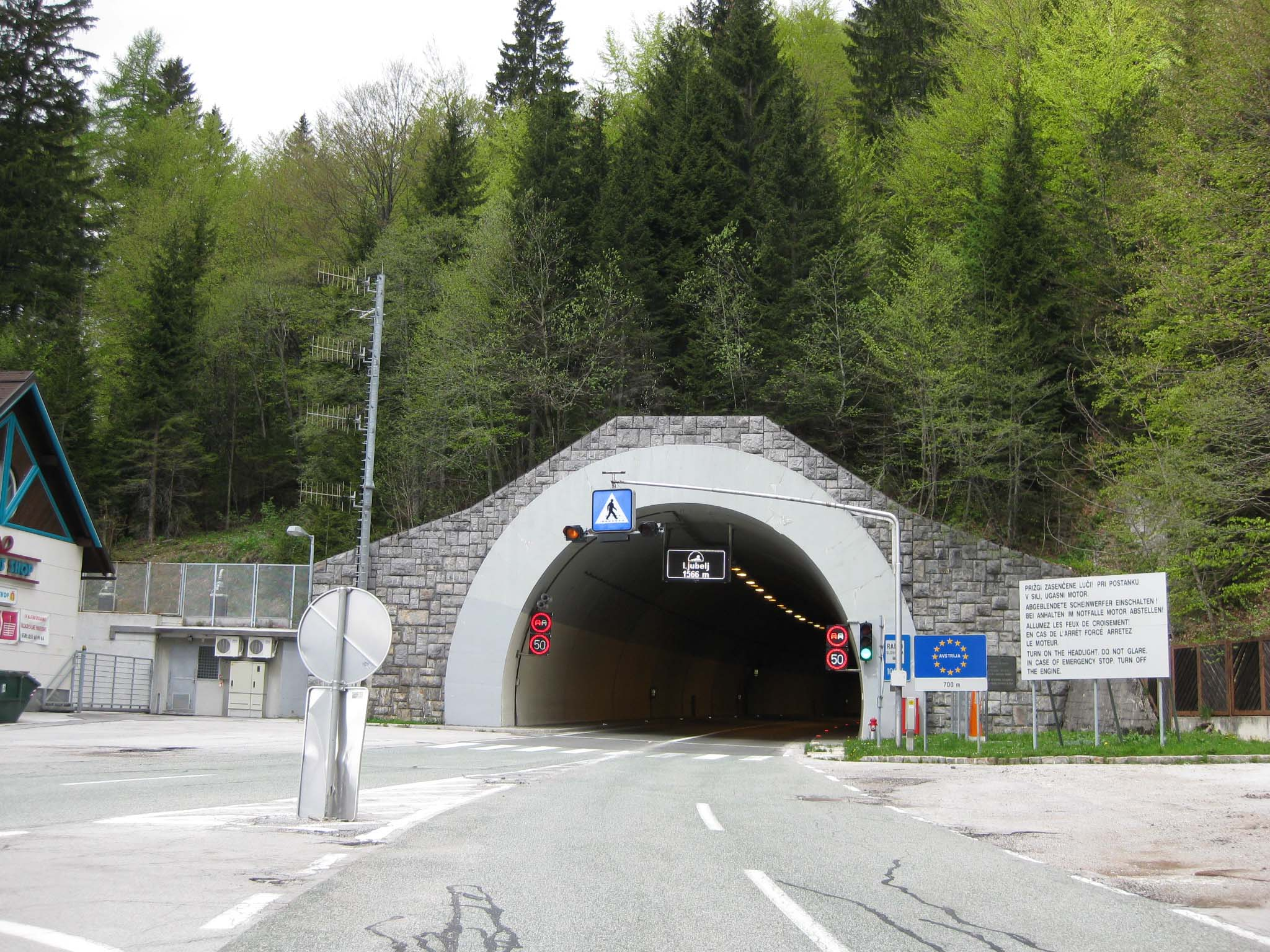 Ljubelj tunnel, Slovenia-Austria border